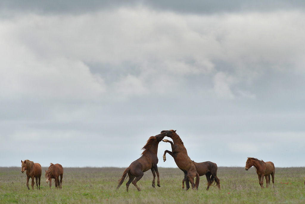 Одичавшие лошади, остров Водный, Ростовский заповедник